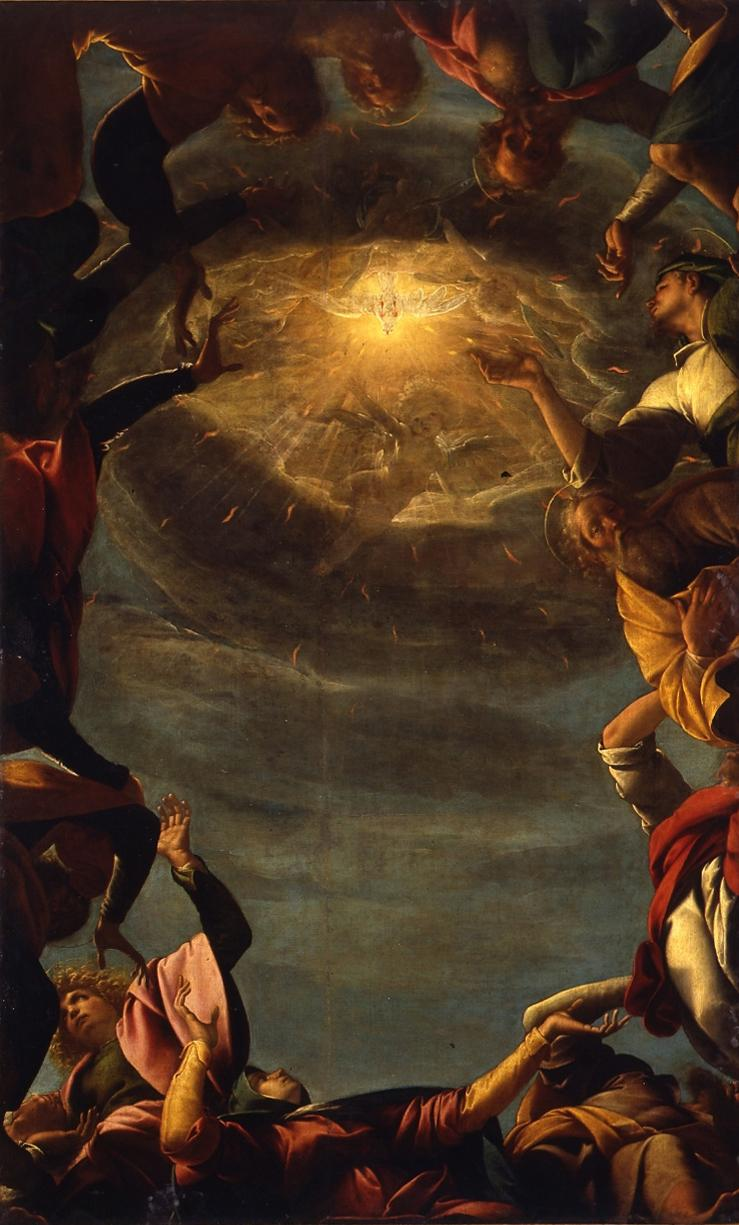 Pentecostés (1615), de Il Morazzone, Museo d'Arte Antica del Castello Sforzesco, Milán.